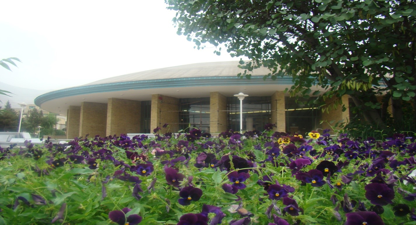 شبکة الجامعات الإفتراضیة فی العالم الإسلامی